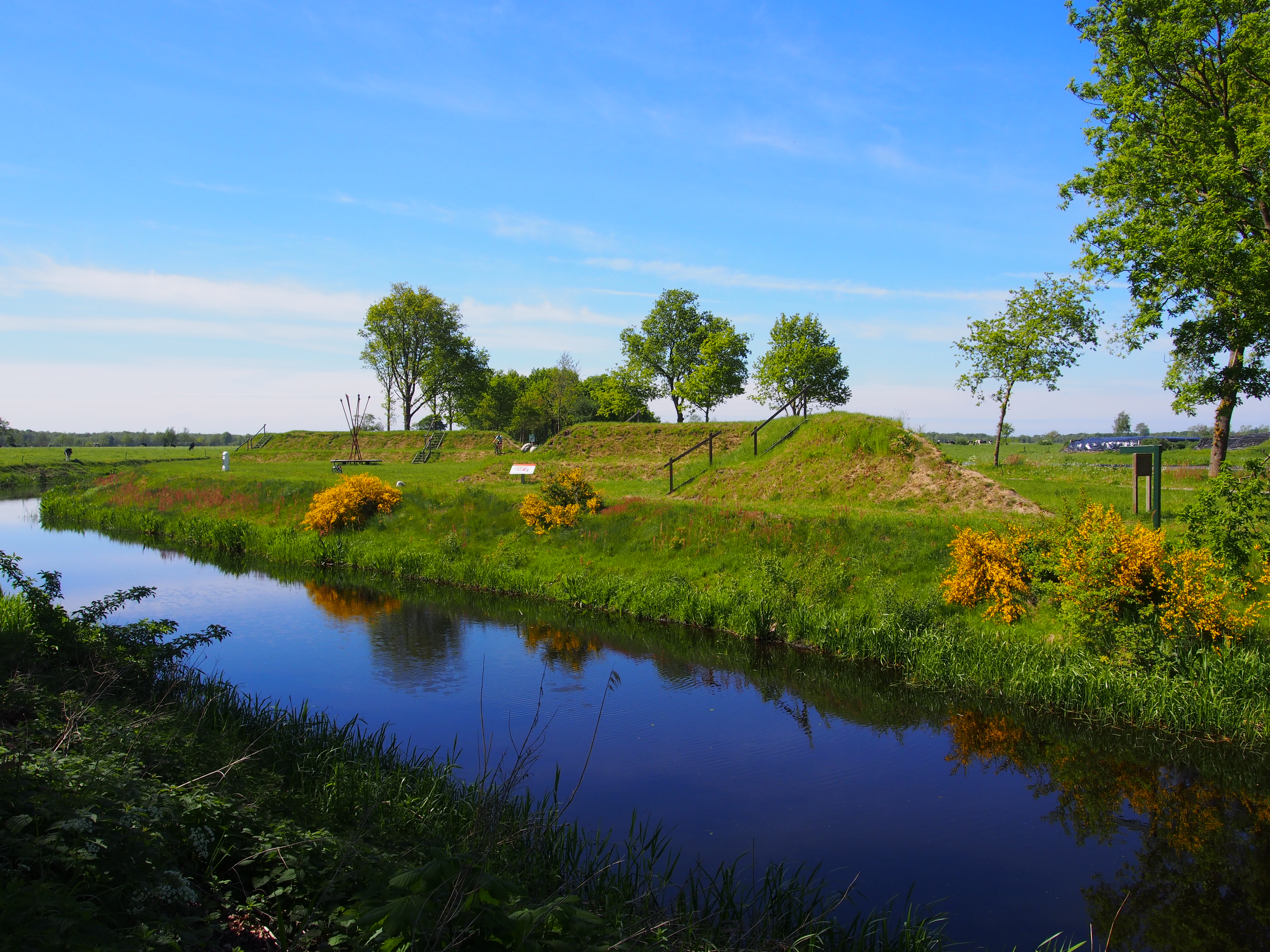 De Schans 2014 Frieschepalen